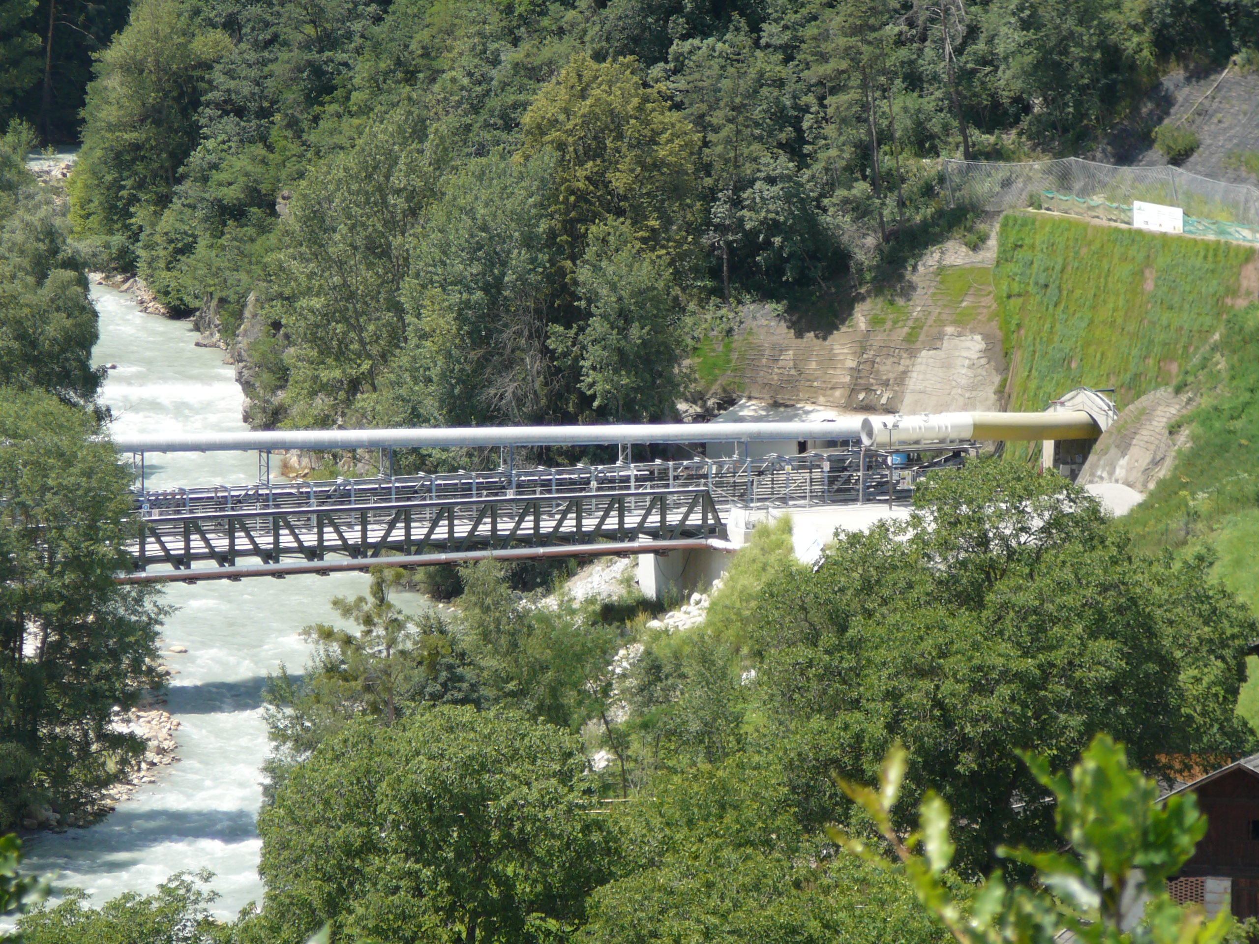 Lo scavo del tunnel di base del Brennero ad Aica, nei pressi di Fortezza